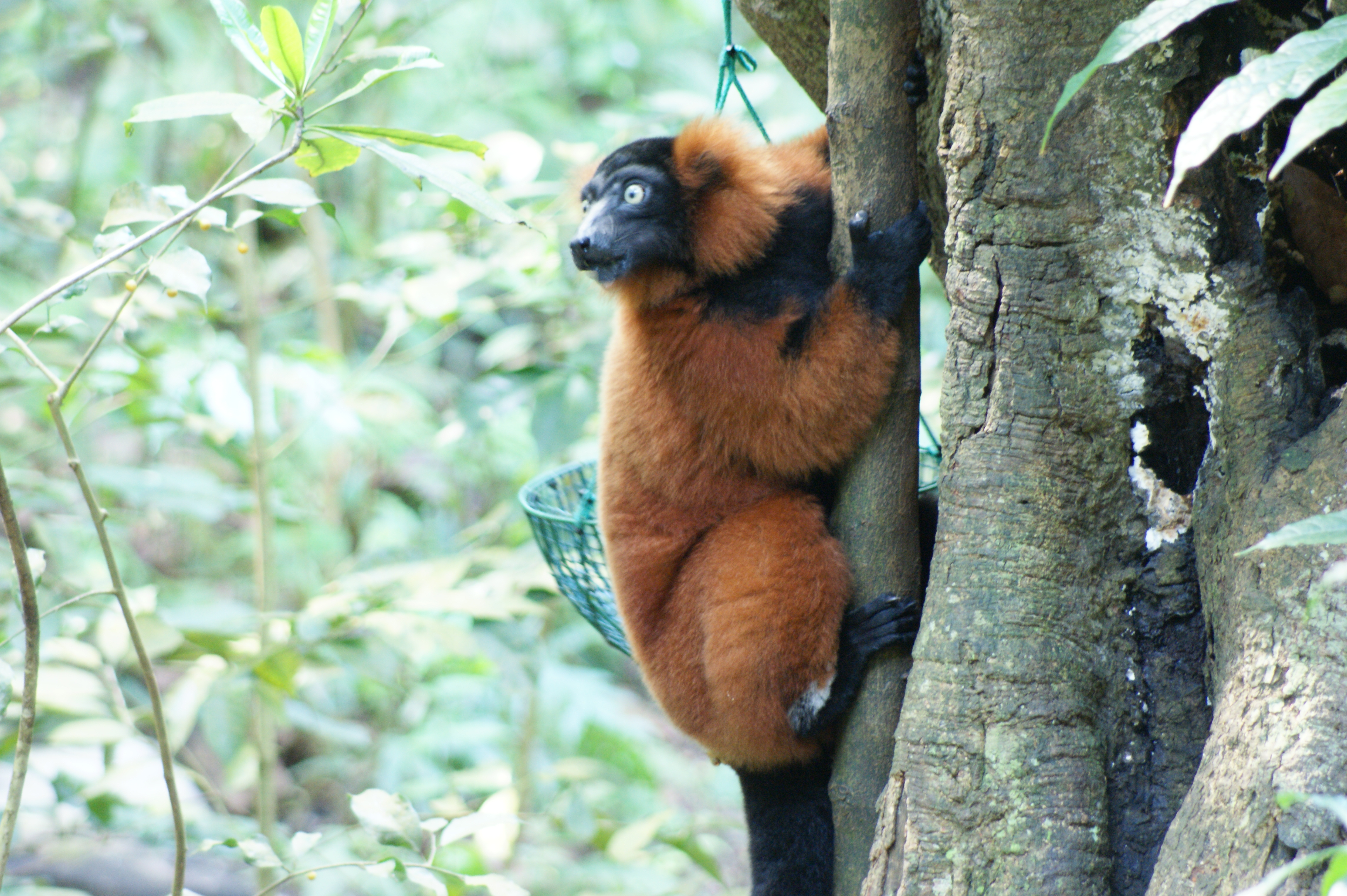 Roter Vari in der Masoala-Halle, Zoo Zürich